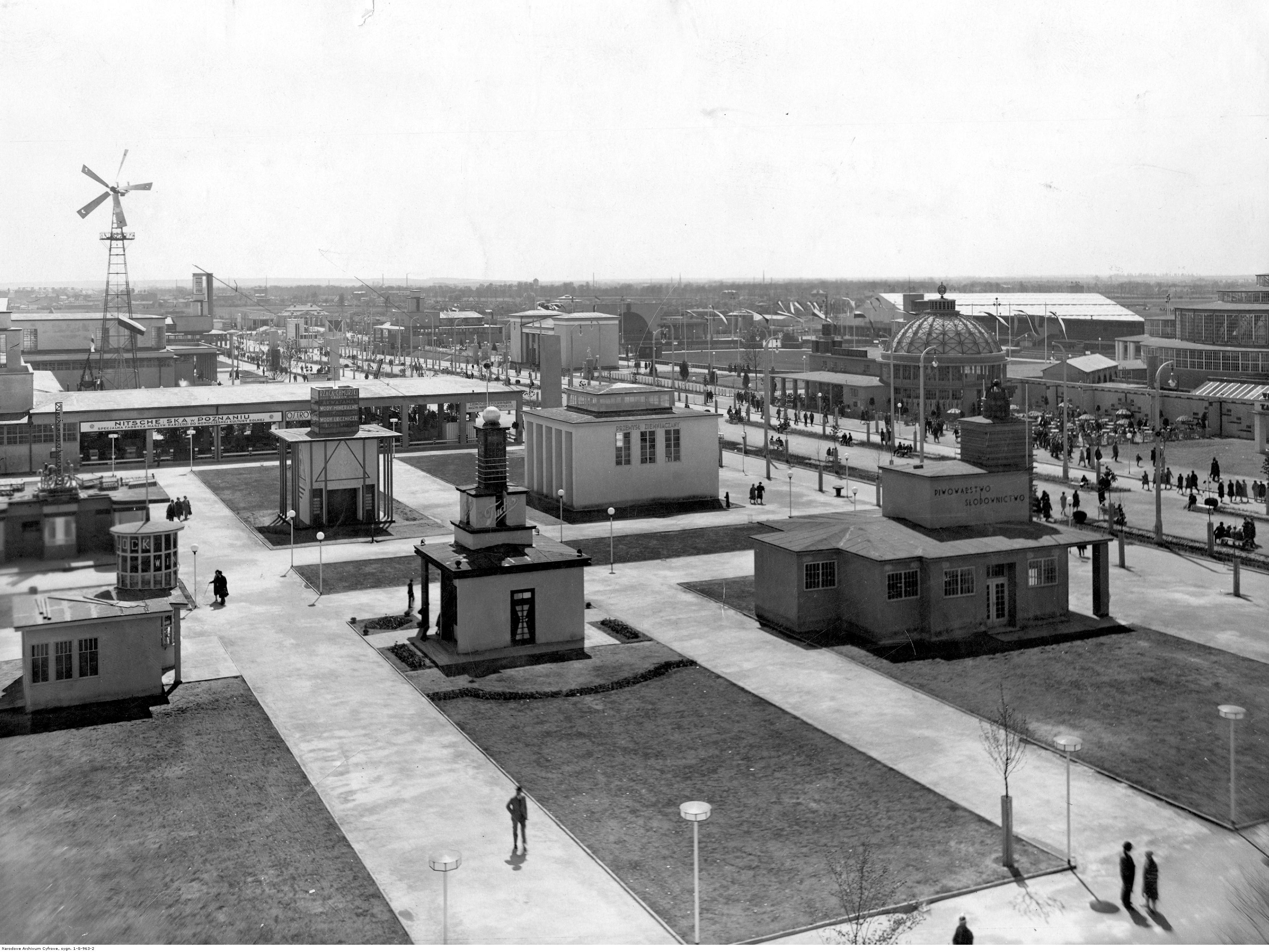 Pawilony przemysłu spożywczego na Powszechnej Wystawie Krajowej w Poznaniu - widok zewnętrzny.